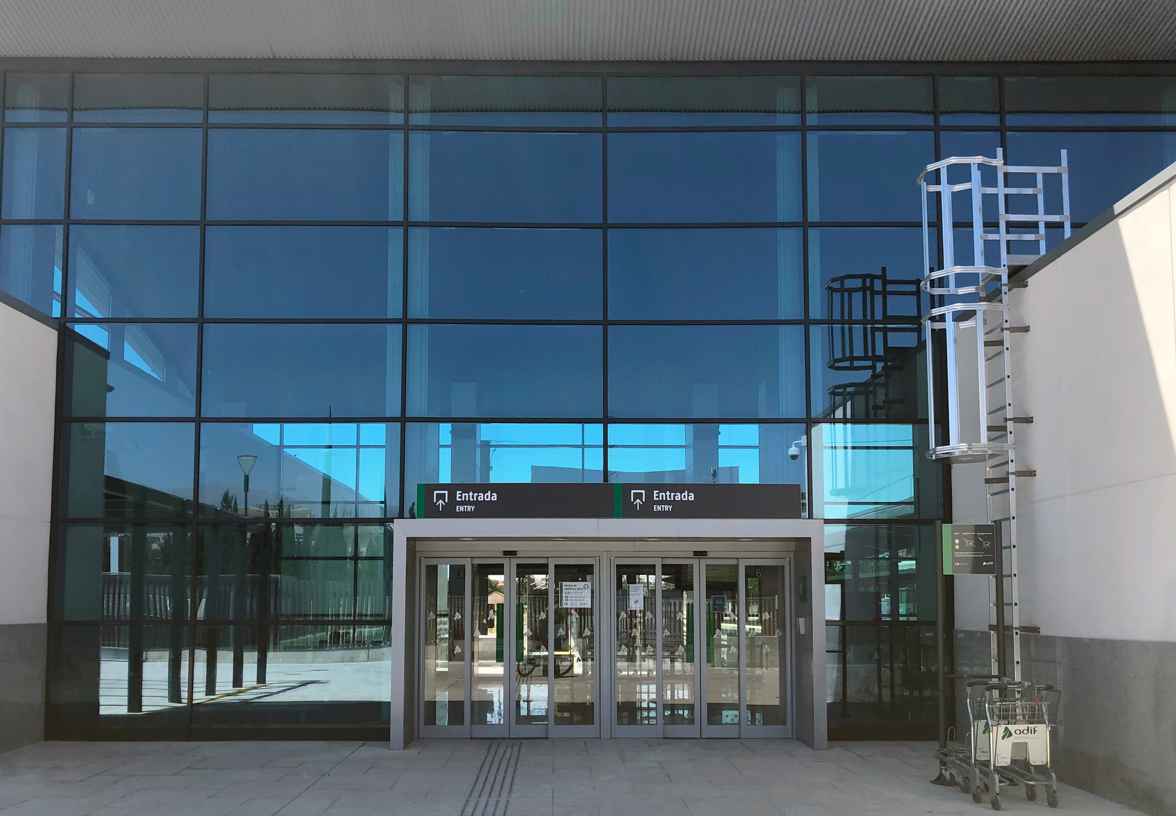 Fachada principal de la Estación de Ferrocarril de Granada